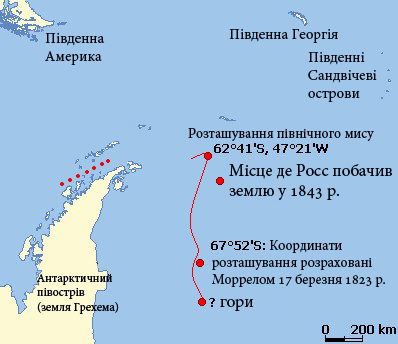 New_South_Greenland_Map_ua.jpg: Карта регіону експедиції Бенджаміна Моррела з позначенням основних її пунктів